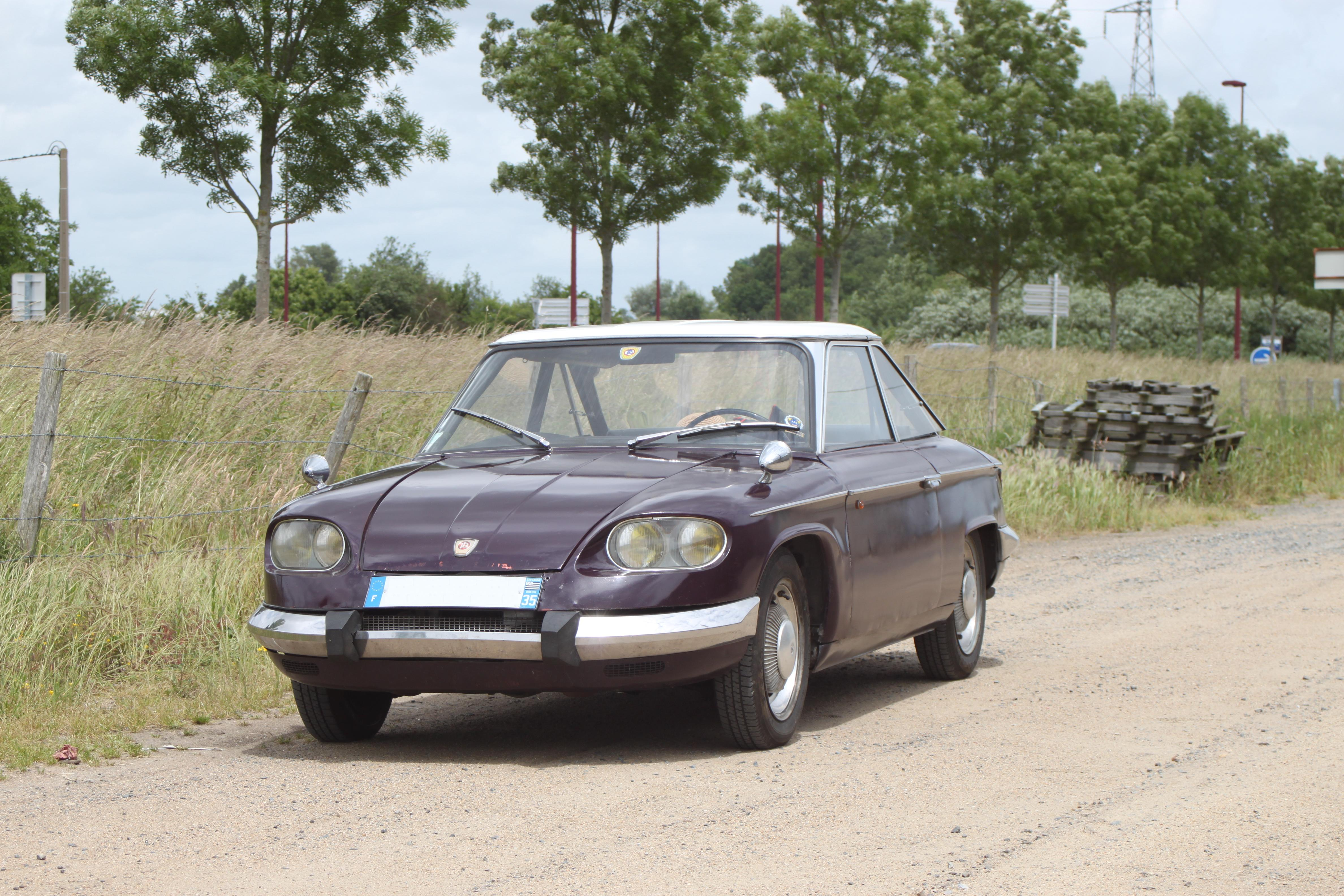 Panhard 24 CT.